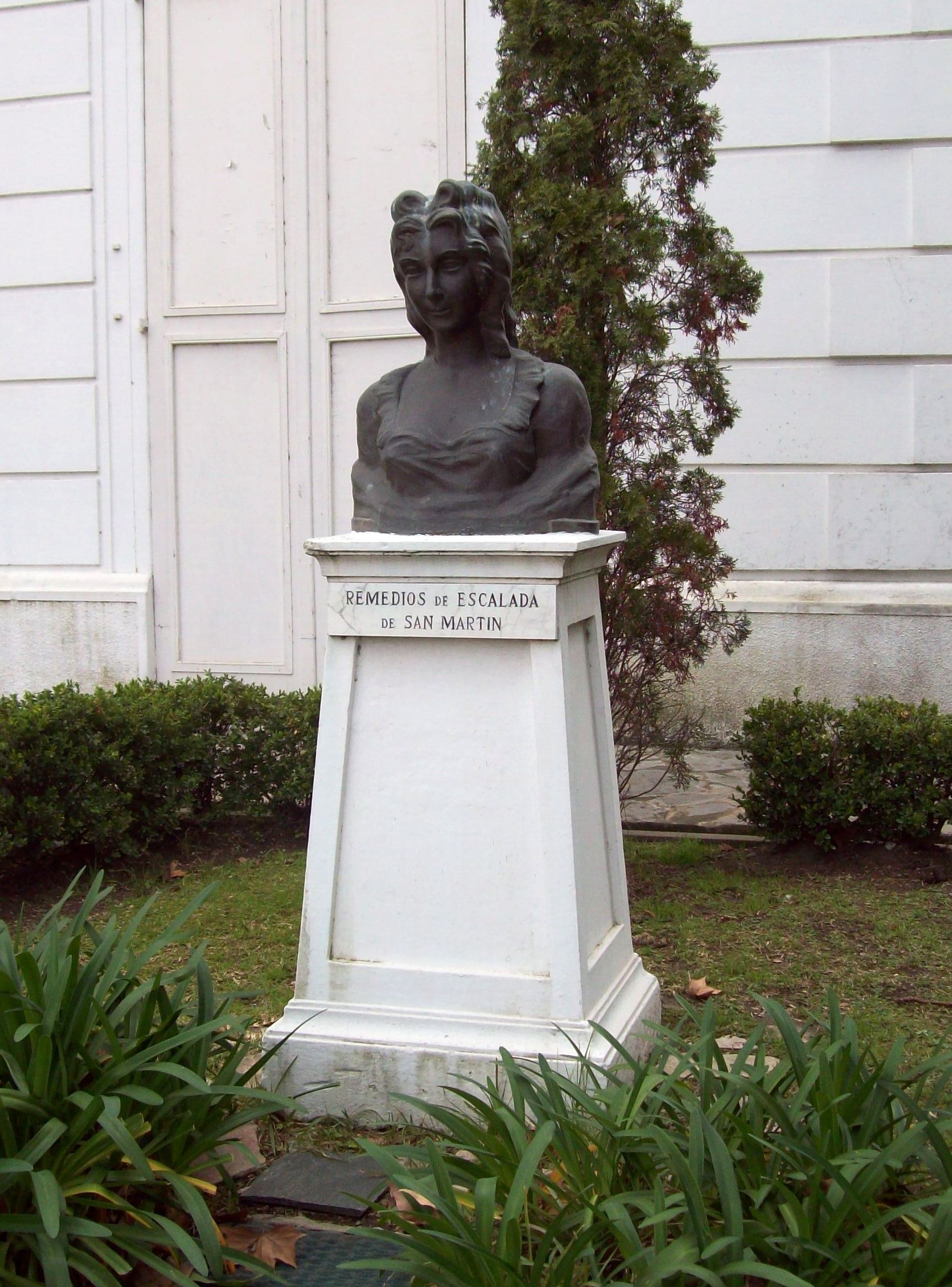 Remedios de Escalada (Buenos Aires, 20 de noviembre de 1797 - Ídem, 3 de agosto de 1823) fue la esposa de José de San Martín y madre de Mercedita, la única hija del «Libertador».